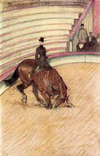 Анри де Тулуз-Лотрек. "В цирке: объездка лошадей", 1899 год